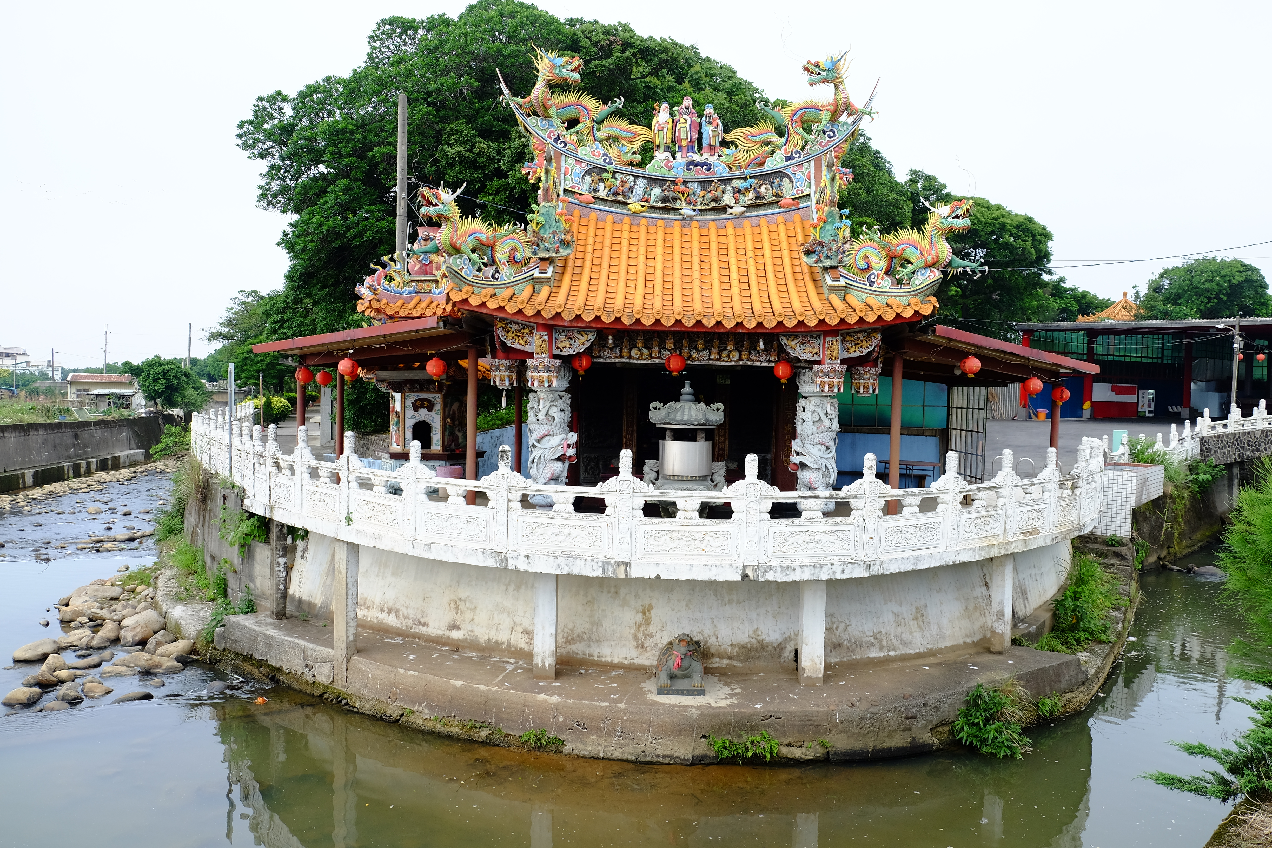 MinZhuGongWang Temple 2018 三芝區民主公王宮2018